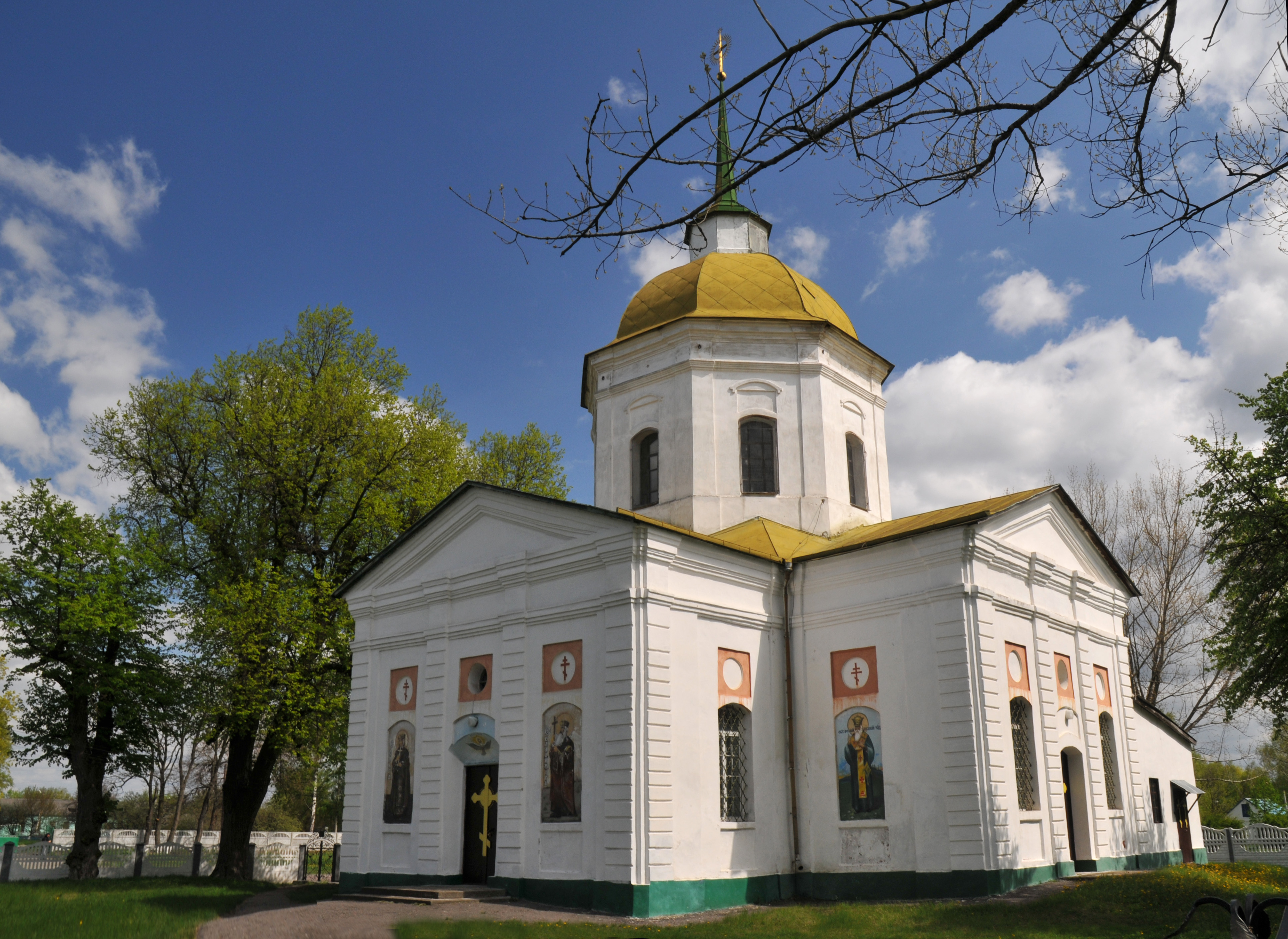 Вишняки, Троїцька церква